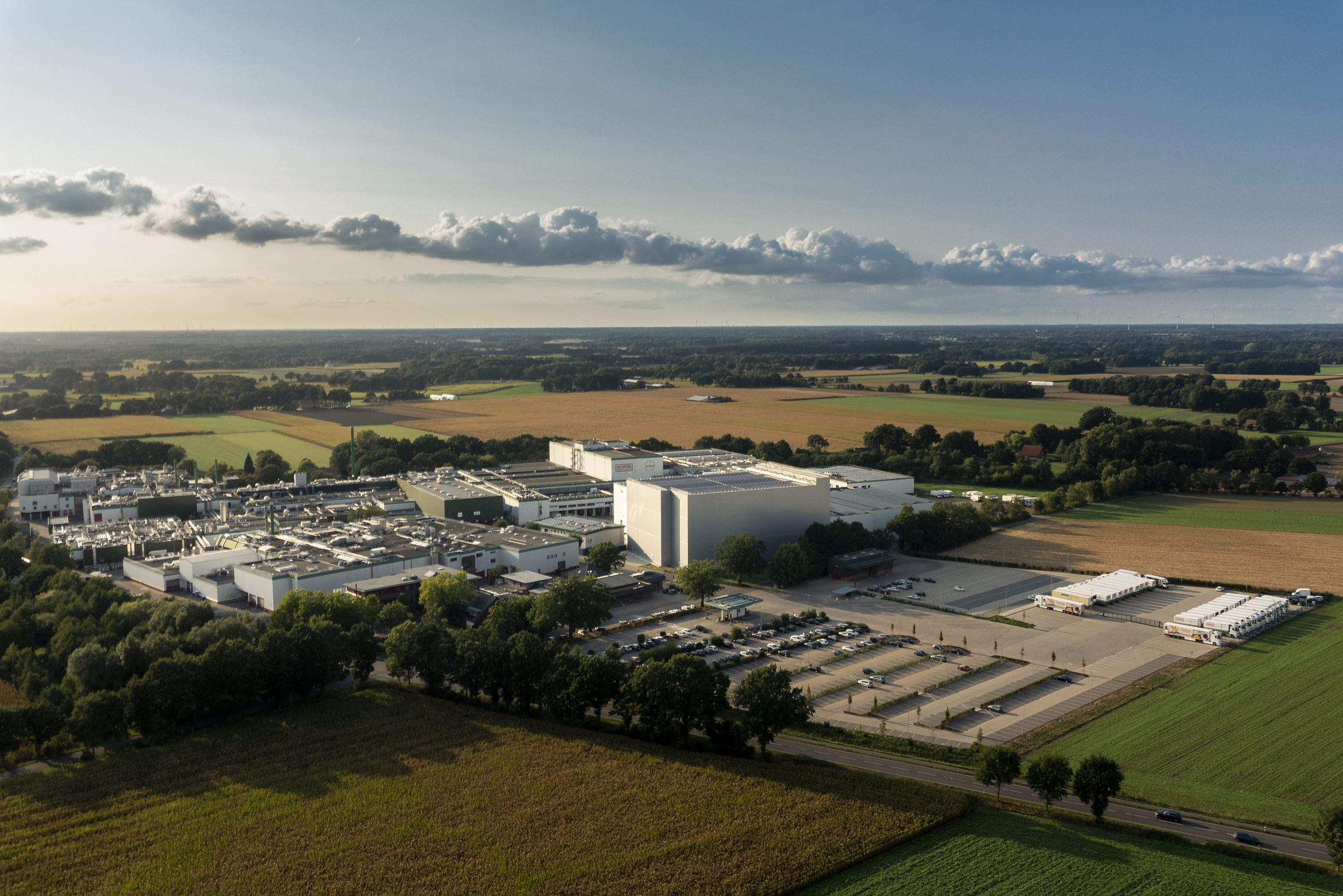 Luftbild der Wernsing Feinkost GmbH